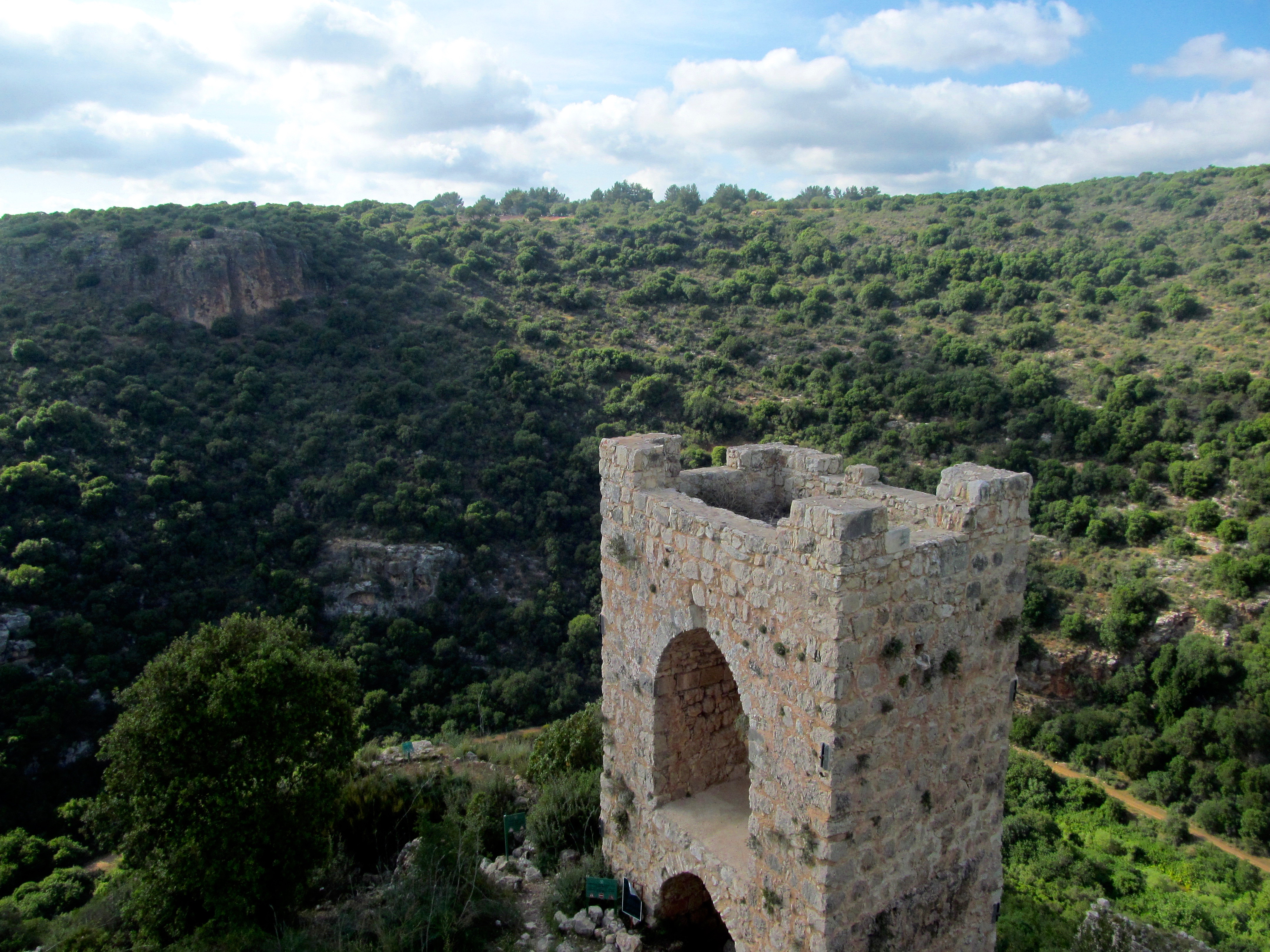 מבצר המוֹנפוֹר (מכונה גם מונפורט בעקבות שמו הצרפתי - MontFort - הר-חזק; גרמנית Starkenberg) הוא אתר ארכאולוגי מתקופת ימי הביניים ובו שרידי מבצר צלבני מתקופת ממלכת ירושלים בארץ ישראל. המבצר בנוי על שלוחה צרה ותלולה בגדתו הדרומית של ערוץ נחל כזיב בסמוך לקיבוץ אילון, כ-13 קילומטרים מצפון-מזרח לעיר נהריה וכ-6 קילומטרים מצפון-מערב לעיר מעלות תרשיחא. האתר הוא גן לאומי בתוך שמורת הטבע נחל כזיב.